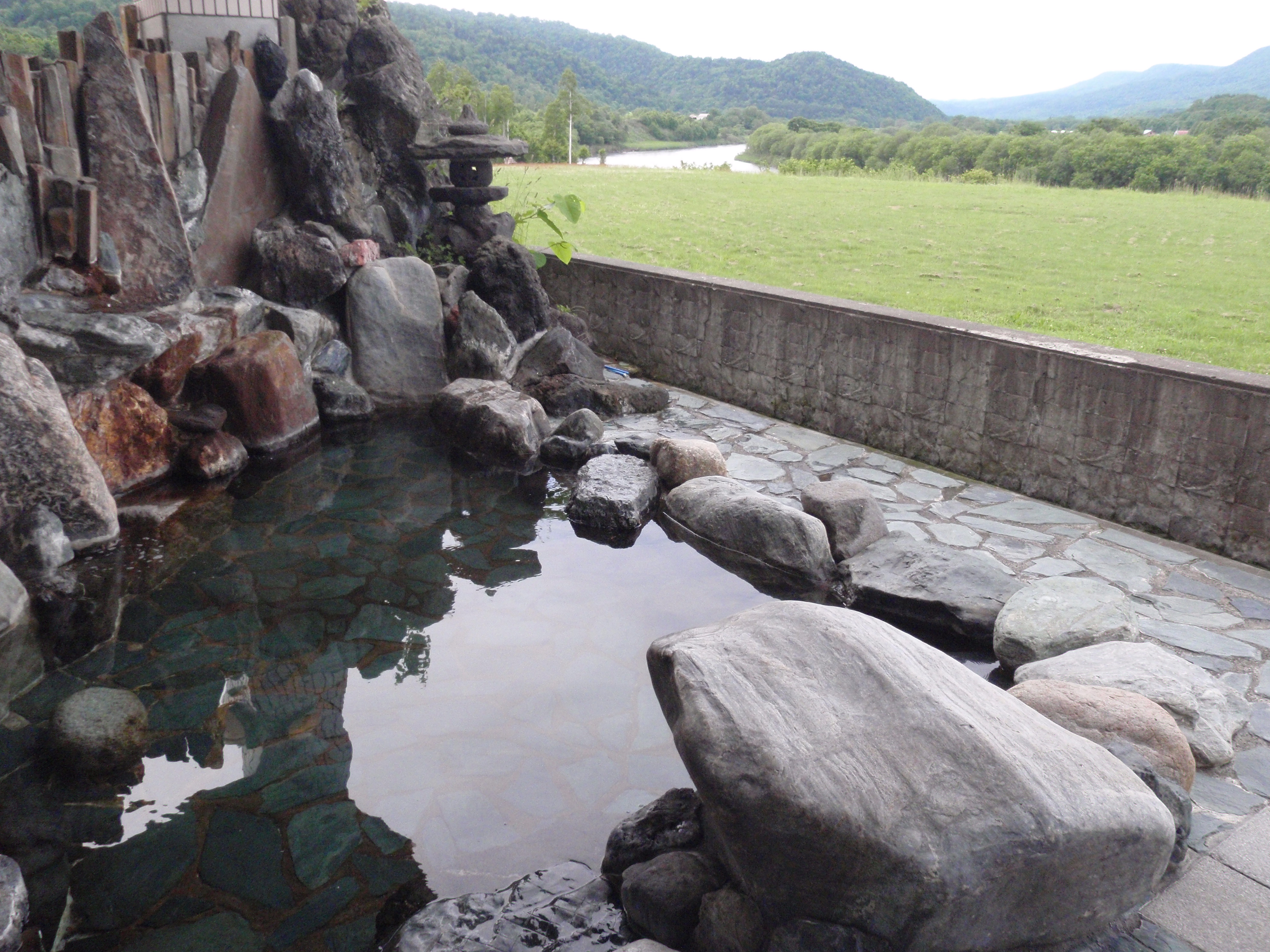 天塩川温泉 露天風呂